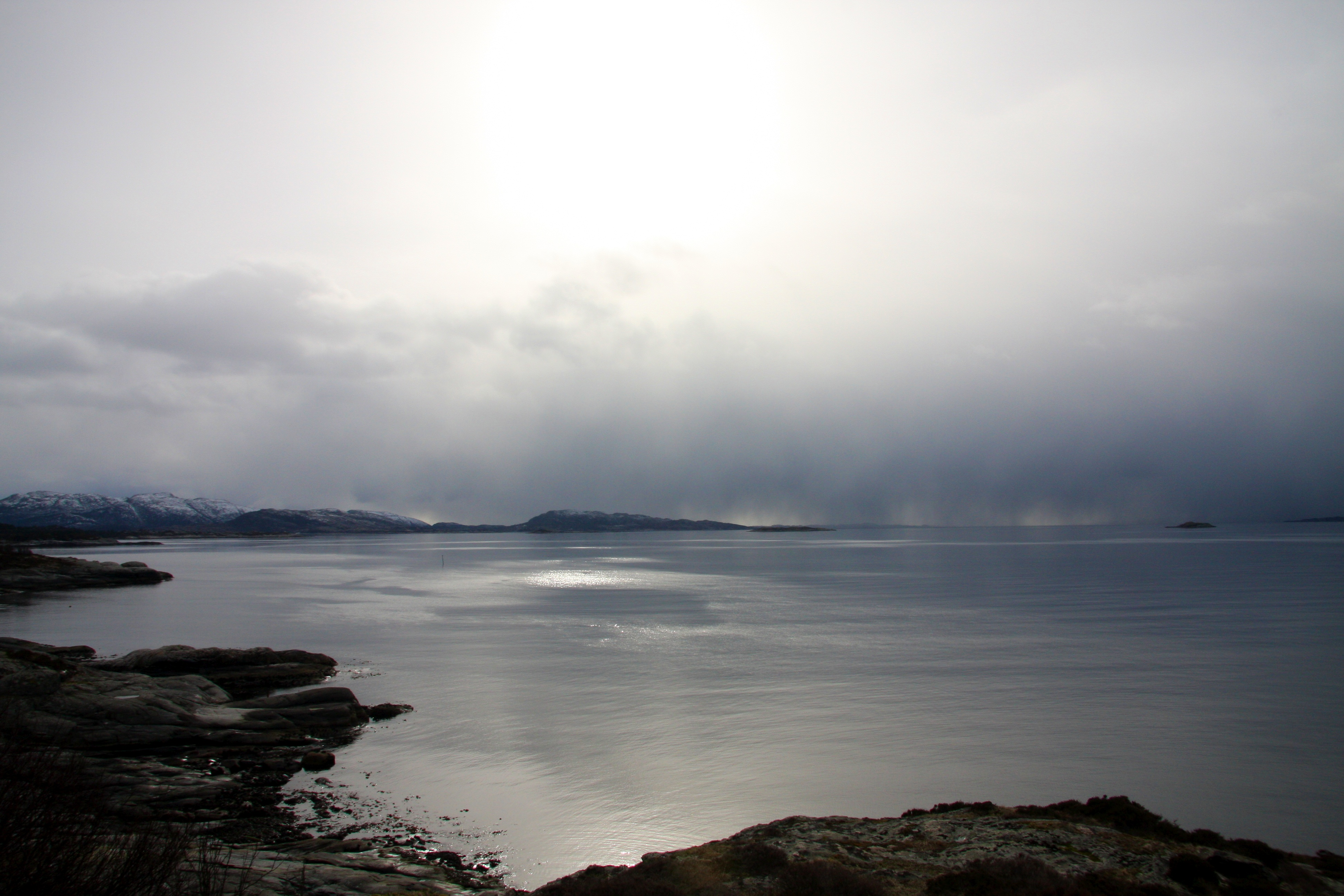 Gulen